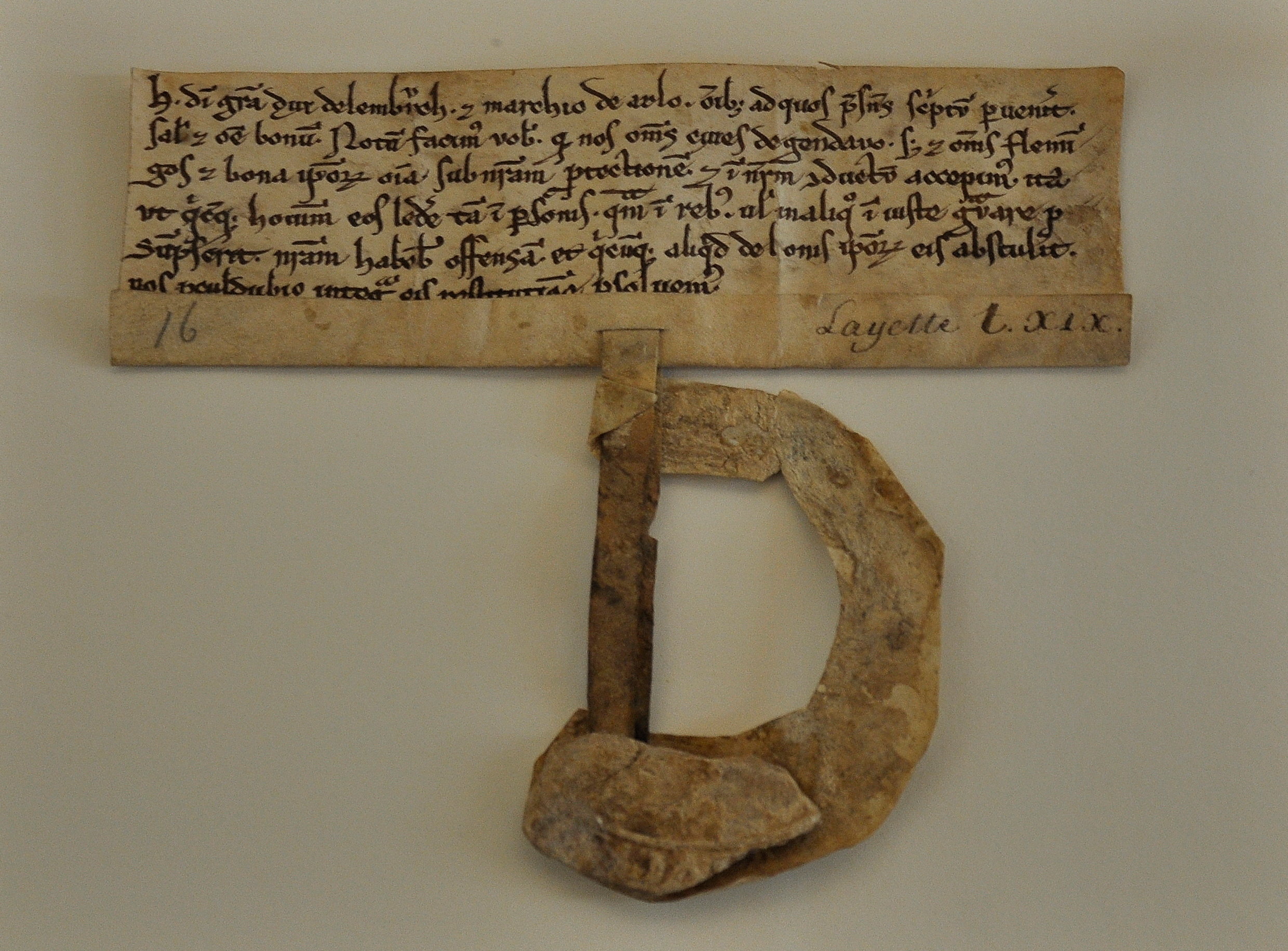 Vrijgeleide (ca. 1200) verleend door Hendrik III, hertog van Limburg, aan Gentse handelaars om handel te kunnen drijven met het Rijnland - bewaard in het Stadsmuseum Gent (STAM)